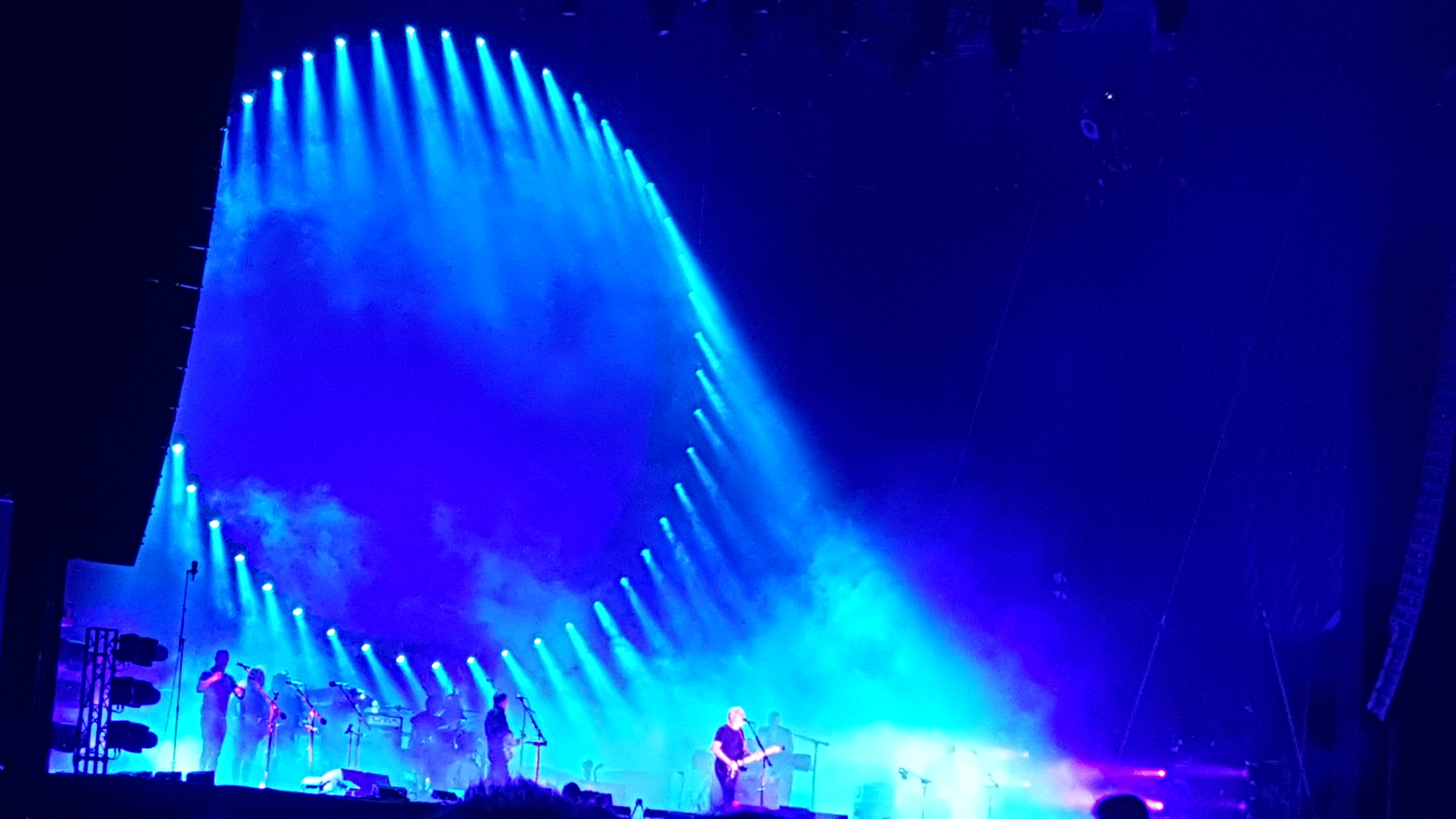 David Gilmour - Viedeň, 28.6.2016